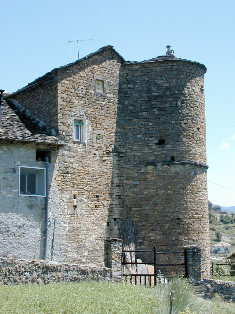 Casa Lanau de Arro (Huesca)